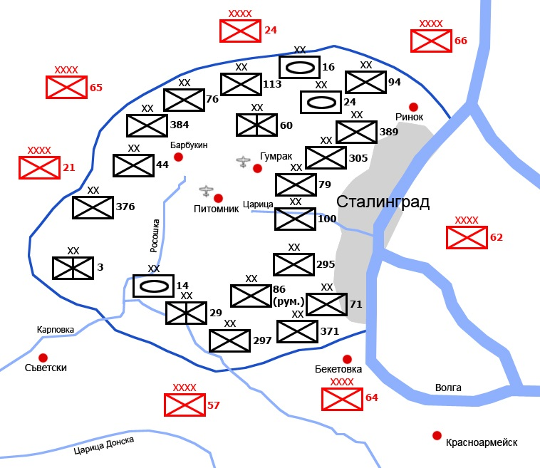 Карта на Сталинград и обградените немски части. Разположението на руските армии и дивизиите на Оста в обкръжението.